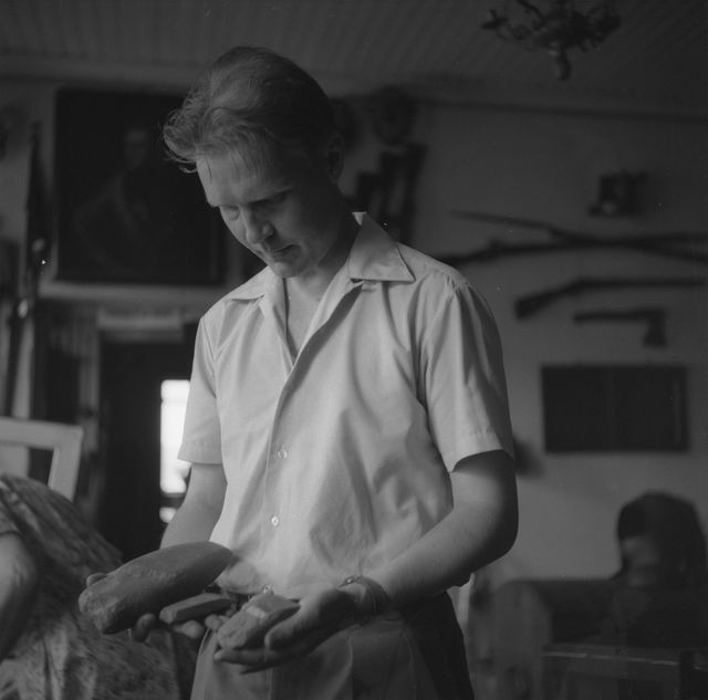 Satakunnan Museon museonjohtaja Unto Salo esittelee arkeologisia esineitä ja talttoja näyttelytilassa Gallen-Kallelankadulla 1957